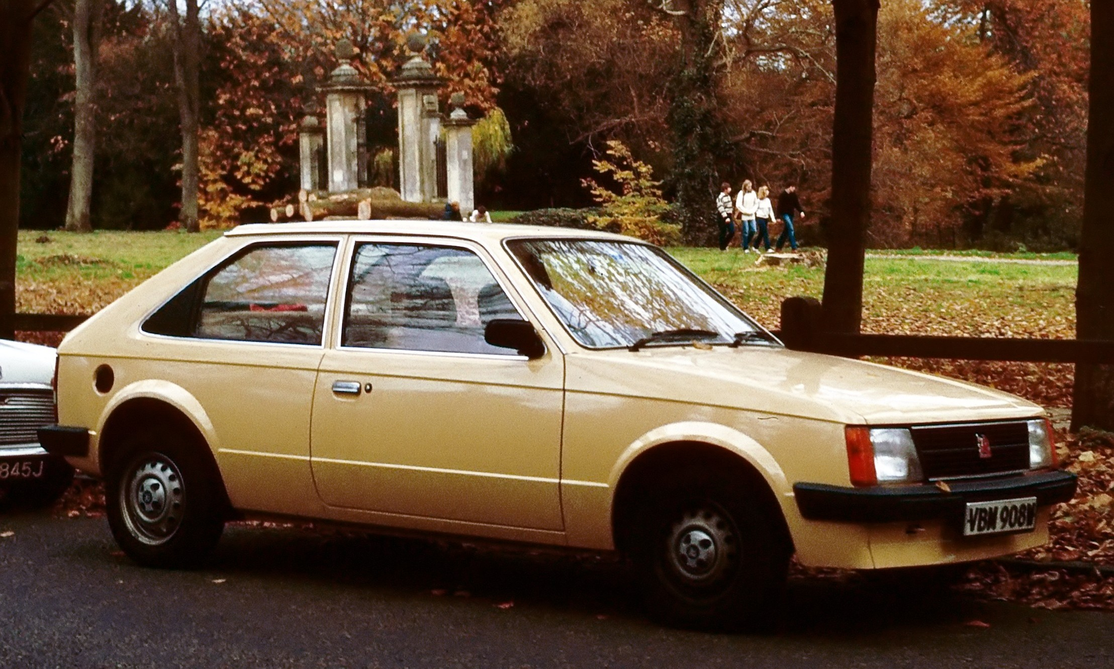 Vauxhall Astra 2 door Cambridge